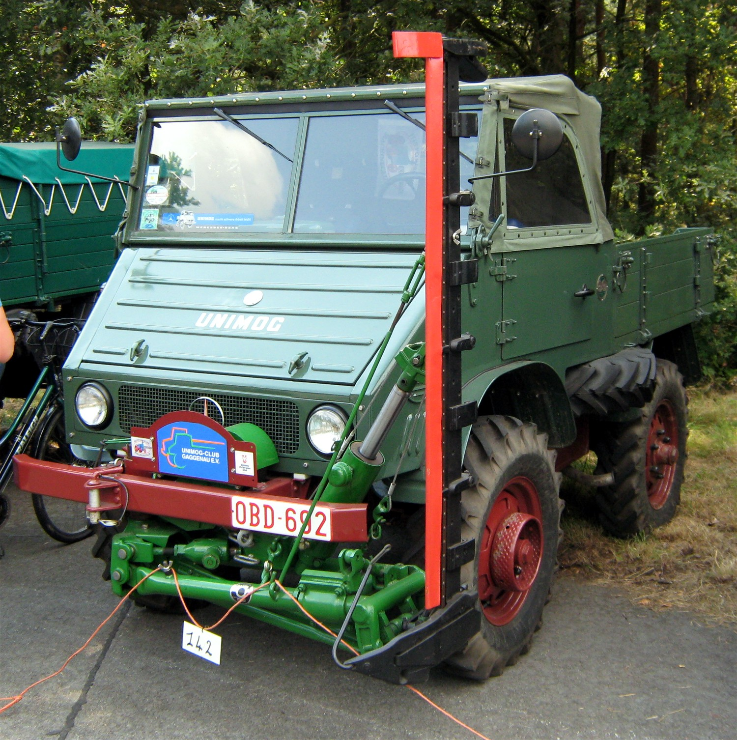 Vliegfeld Weelde, 21ste Oldtimer Festival des Historische Machineclubs Kempen, Unimog 411 (Urtyp) Cabrio mit Mähbalken